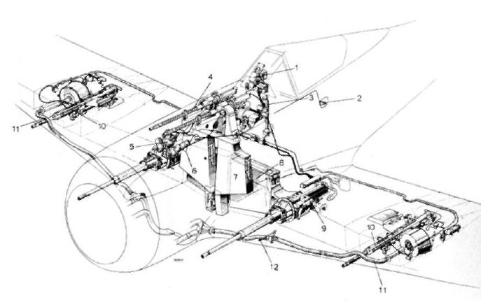 Weapons arrangement of a German Focke-Wulf Fw 190A (A-2 to A-5) fighter. 1: Revi c/12D 2: Preßluftanschluß 3: KG 14 4: MG 17 5: elt. Geber DSG3AL 6: Geber 17 mit EKu17 7: Gurtkasten für MG 17 (900 Schuß) 8: Gurtkasten MG 151 20E (250 Schuß) 9: MG 151/20E 10: MG FFM 11: Heizrohr 12: Ziellinienprüfrohr